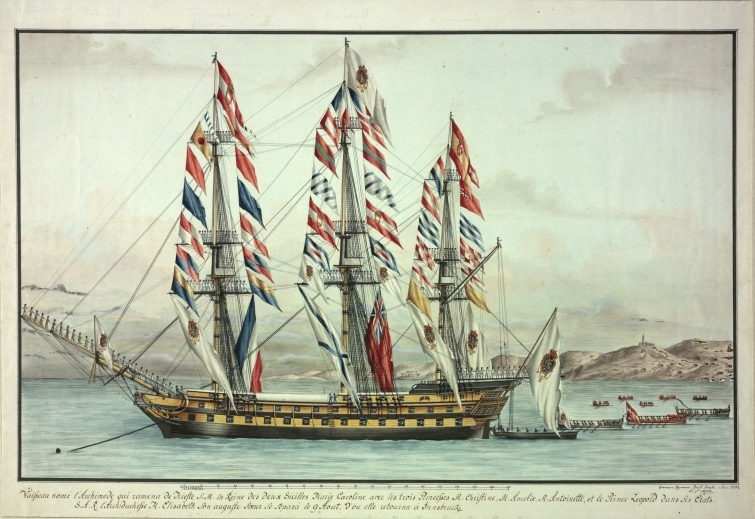 La regina del Regno delle Due Sicilie Maria Carolina ritornò da Vienna via Trieste a Napoli a bordo del vascello di due ponti Archimede nel 1802.